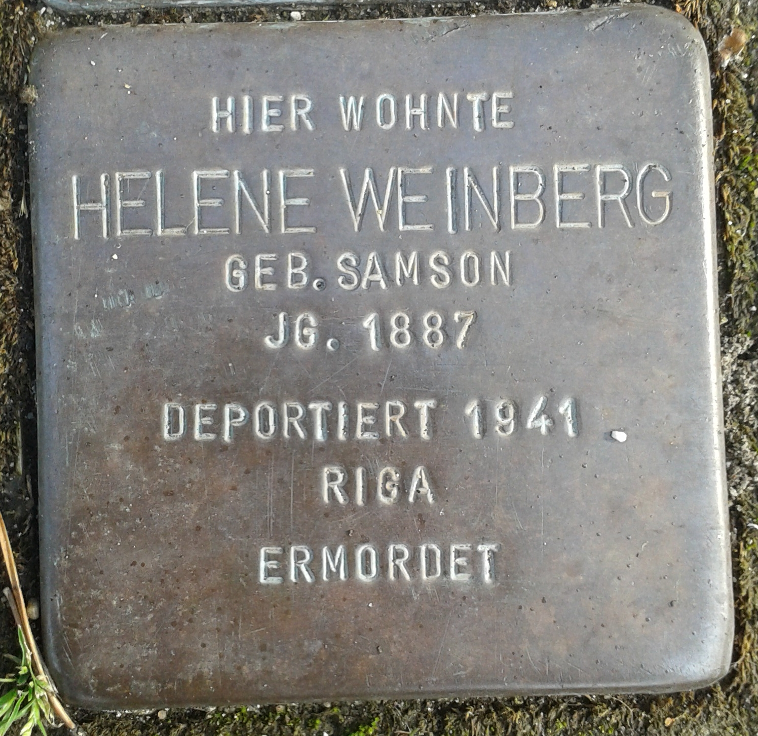 Stolperstein Selm Bahnhofstraße 37 Helene Weinberg